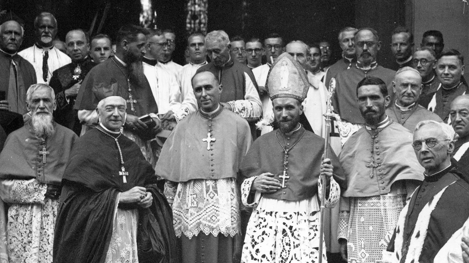 Consécration épiscopale de Mgr Marcel Lefèbvre par le Cardinal Lienart, évêque de Lille, en l'église N.-D. des Anges, à Tourcoing (Nord). On reconnait au premier plan, Mgr Jean-Baptiste Fauret, vicaire apostolique de Loango, (2e à partir de la droite), Mgr Lefèbvre évêque titulaire d'Anthédon (Palestine) et vicaire apostolique de Dakar(3e à partir de la droite) et le cardinal Achille Liénart, consécrateur (5e à partir de la gauche).